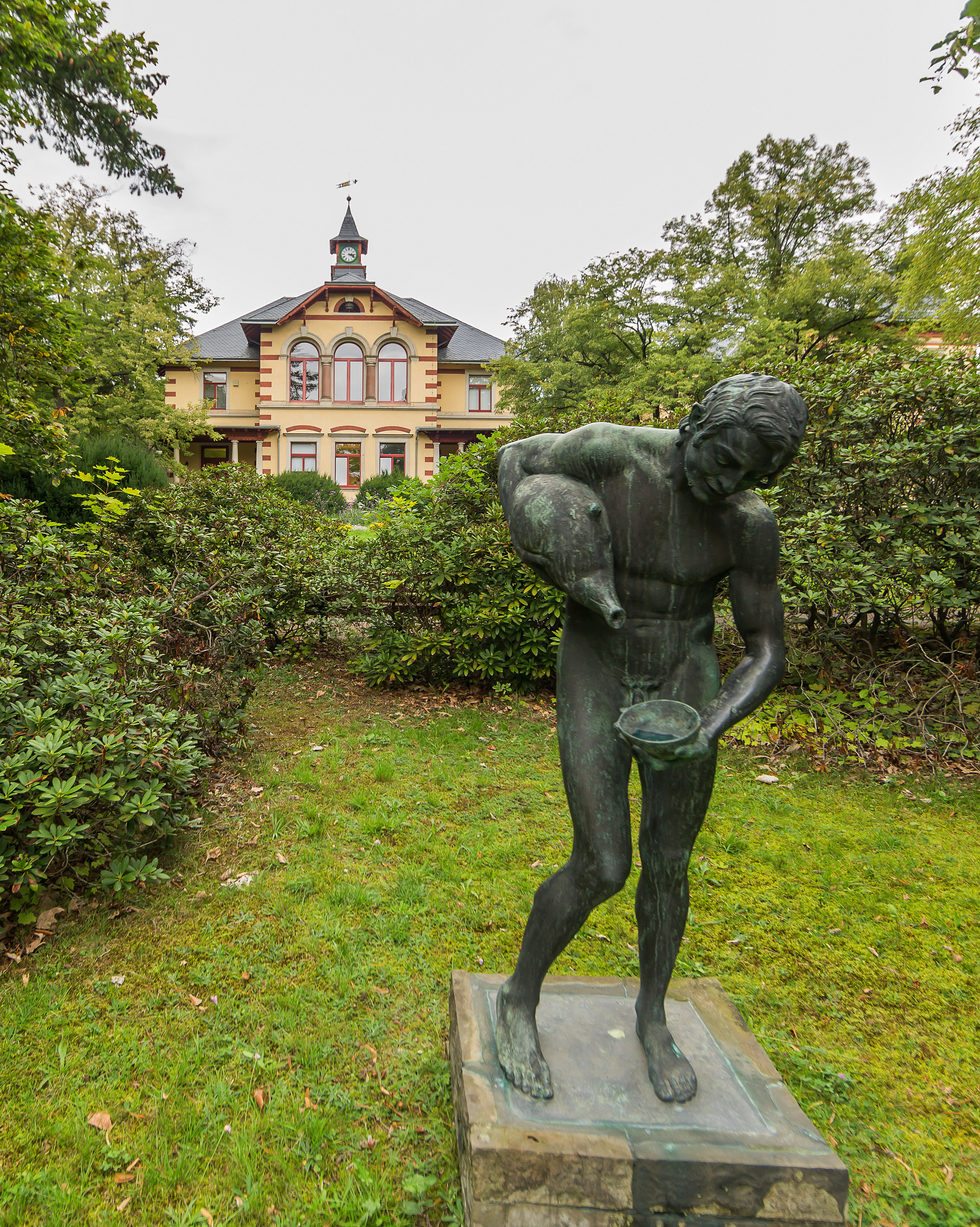 Neucoswig Neucoswiger Straße 21 Heilstätte Lindenhof (Sachgesamtheit) Gesellschaftshaus und Parkskulptur III, dargestellt ist der Waldgott Silen (ein Begleiter des Dionysos), 1912 von Edmund Moeller, siehe Dresden, Gostritzer Str.